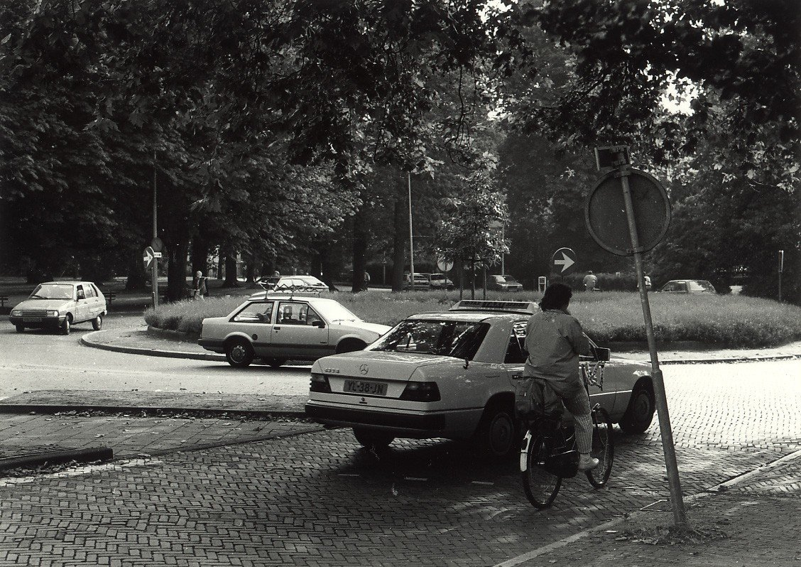 CollectieCollectie Fotoburo de BoerInventarisnummerNL-HlmNHA_54031924BeschrijvingAangekocht in 1991 van United Photos de Boer bv. - Negatiefnummer 32989 k 6 a. - Gepubliceerd in het Haarlems Dagblad van 15.09.1990FotonummerKNA006017126AnnotatiesB043 54/55-022 3079LandNederland ProvincieNoord-Holland GemeenteHaarlem PlaatsHaarlem StraatKenaupark Begindatum14-09-1990Einddatum14-09-1990Datering gebeurtenis14-09-1990TechniekFoto CopyrighthouderUnited Photos de Boer b.v.